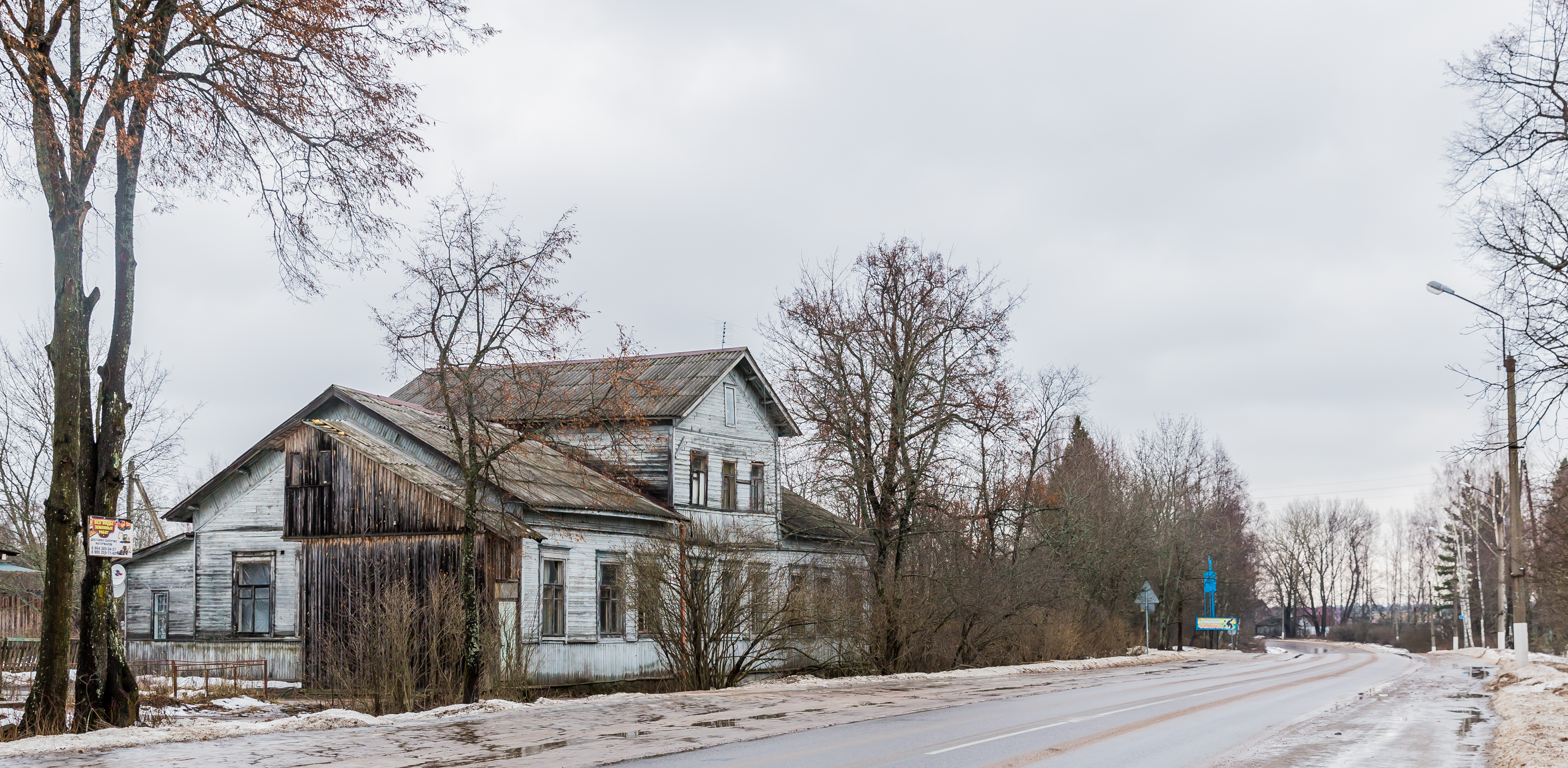 Kyyrölä, Muolaan kunta, pääkatu vuonna 2016, nykyisin Krasnoselskoe